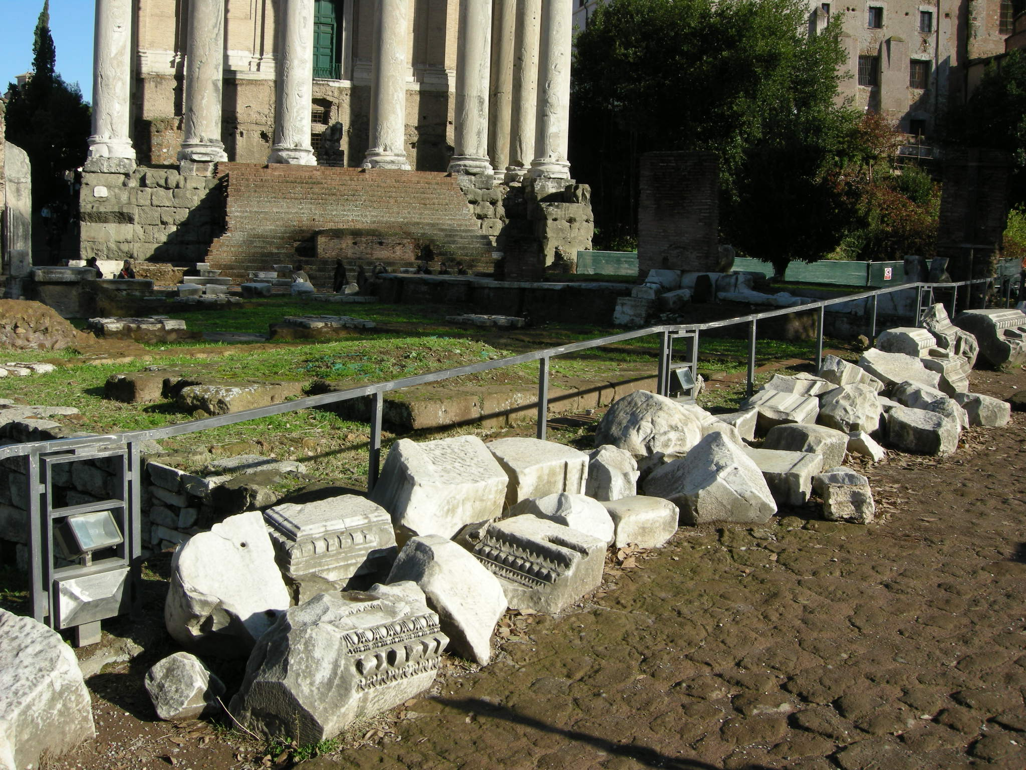 Regia